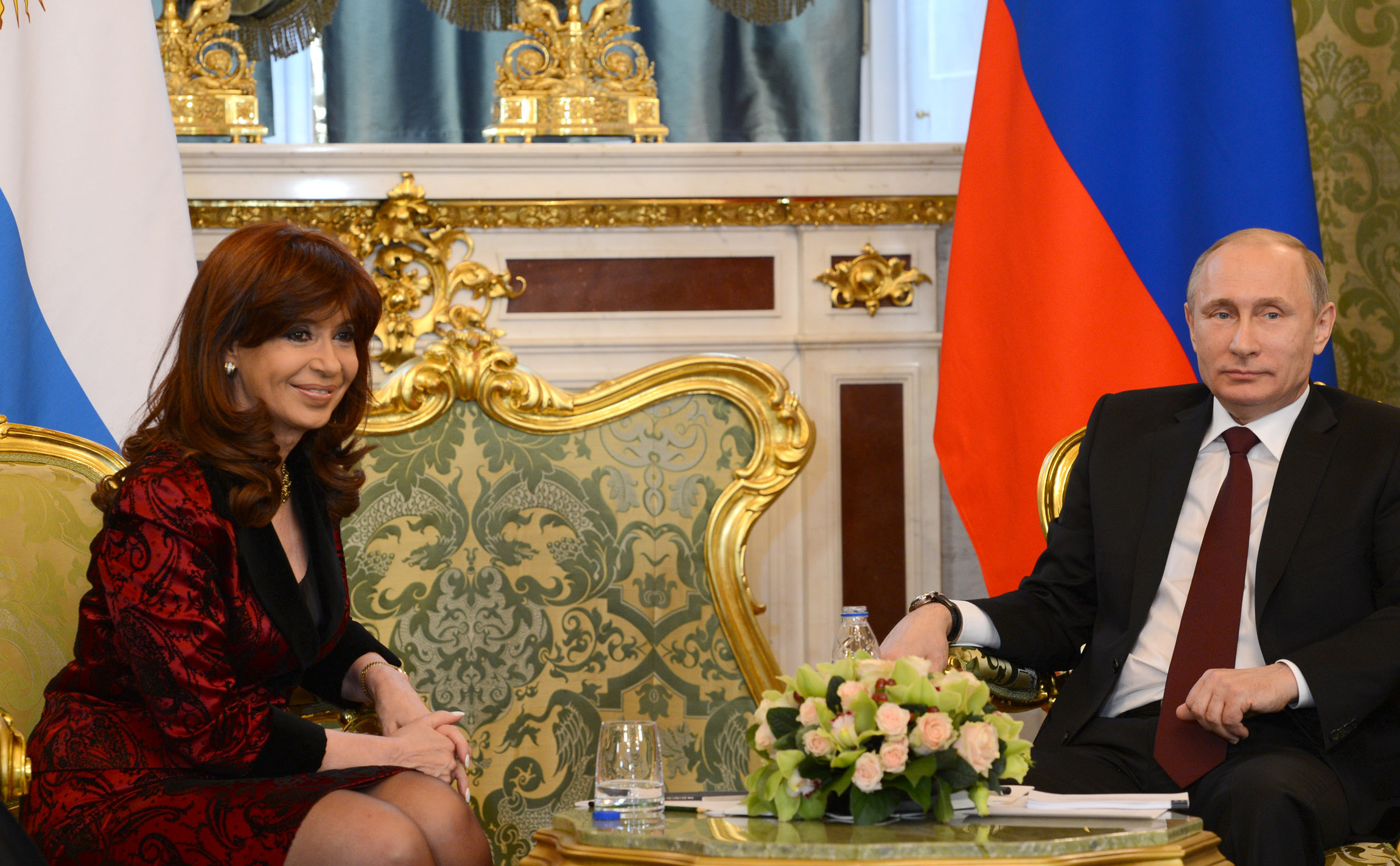 La presidenta Cristina Fernández y su par Vladimir Putin intercambiaron saludos en el Salón Verde del Kremlin, sede del gobierno ruso, previo a la reunión que mantienen a solas.